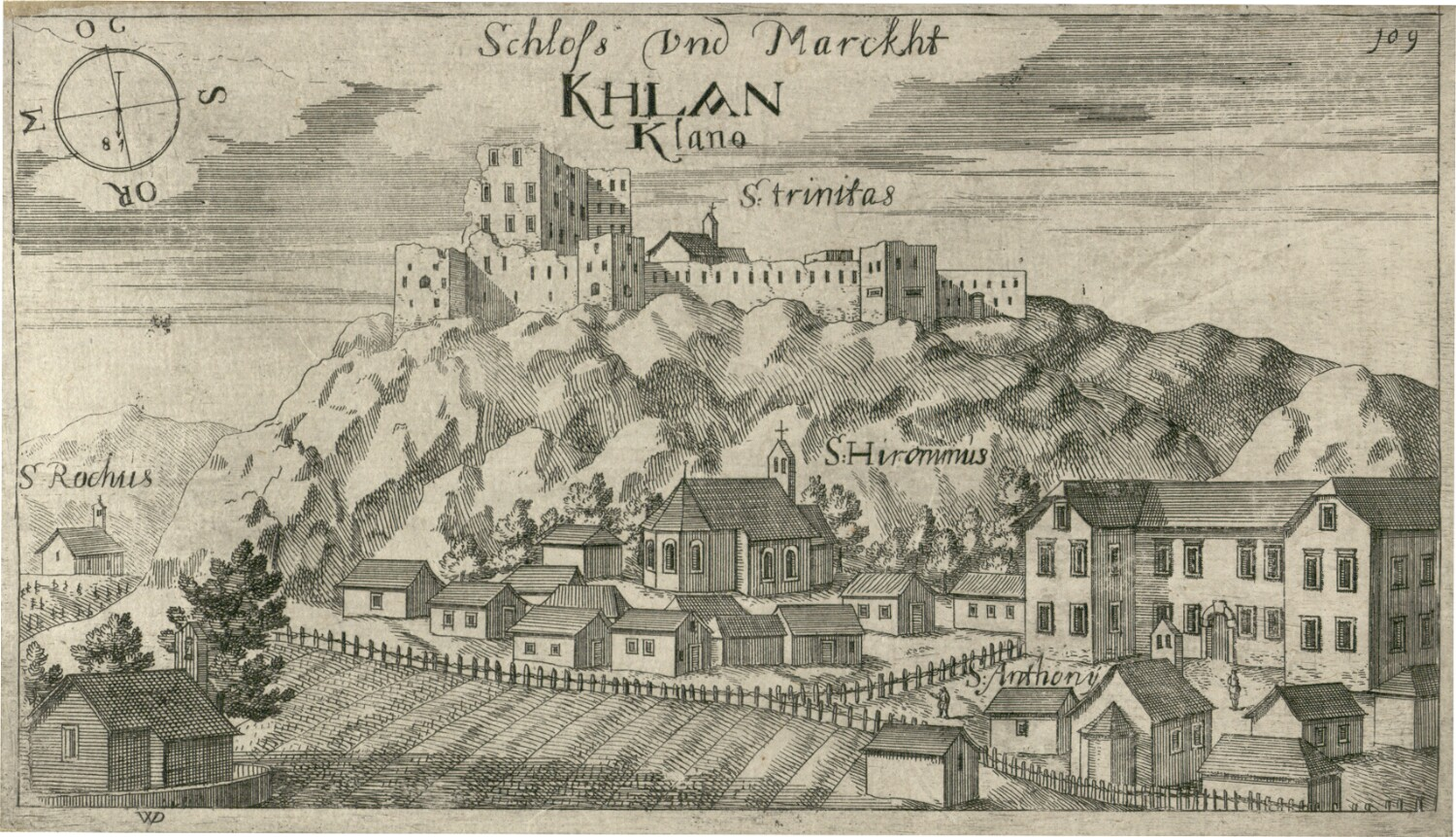 Klana